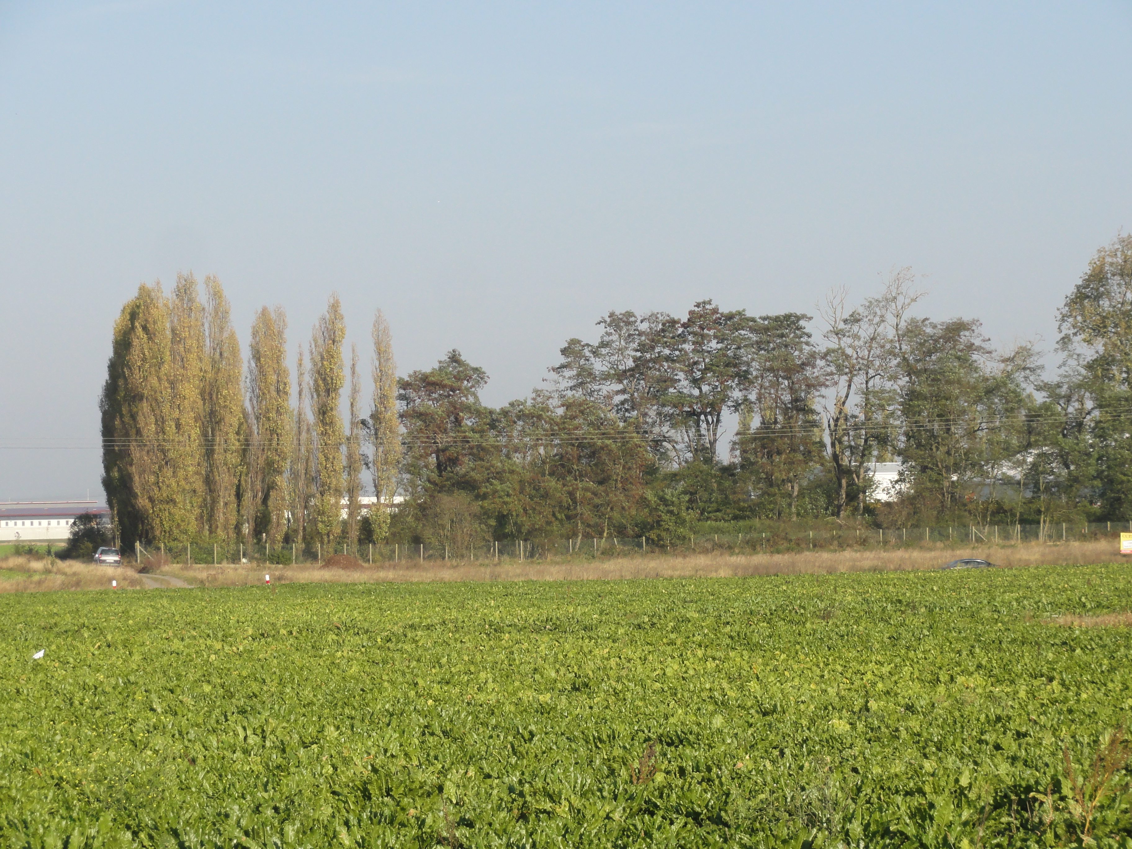 Terril n° 121 dit 11 d'Oignies, disparu, Fosse n° 1 de la Compagnie des mines de Carvin, Carvin, Pas-de-Calais, Nord-Pas-de-Calais, France.